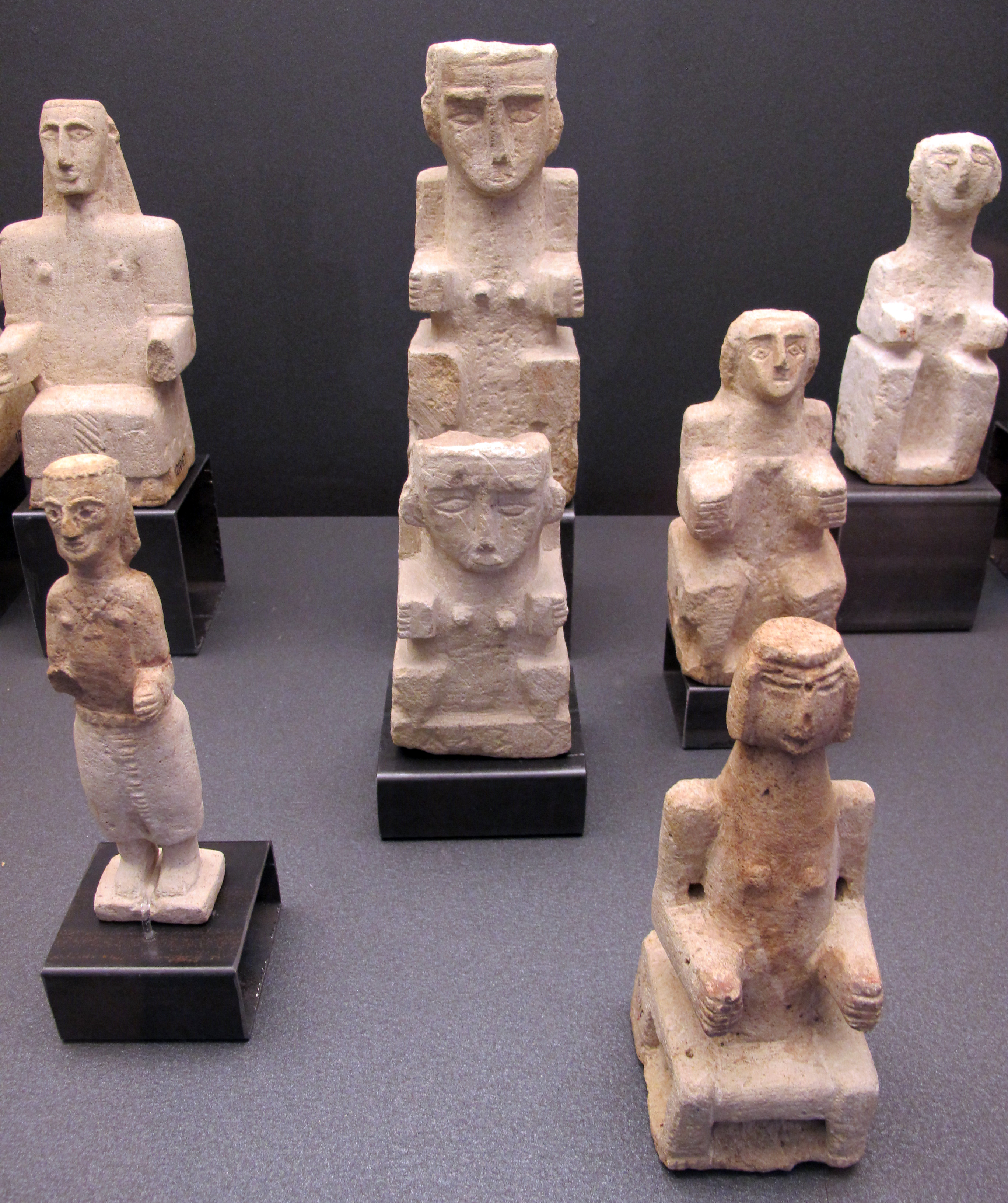 Antico yemen, al-jawf, statuette di donne sedute, III-I sec. ac.